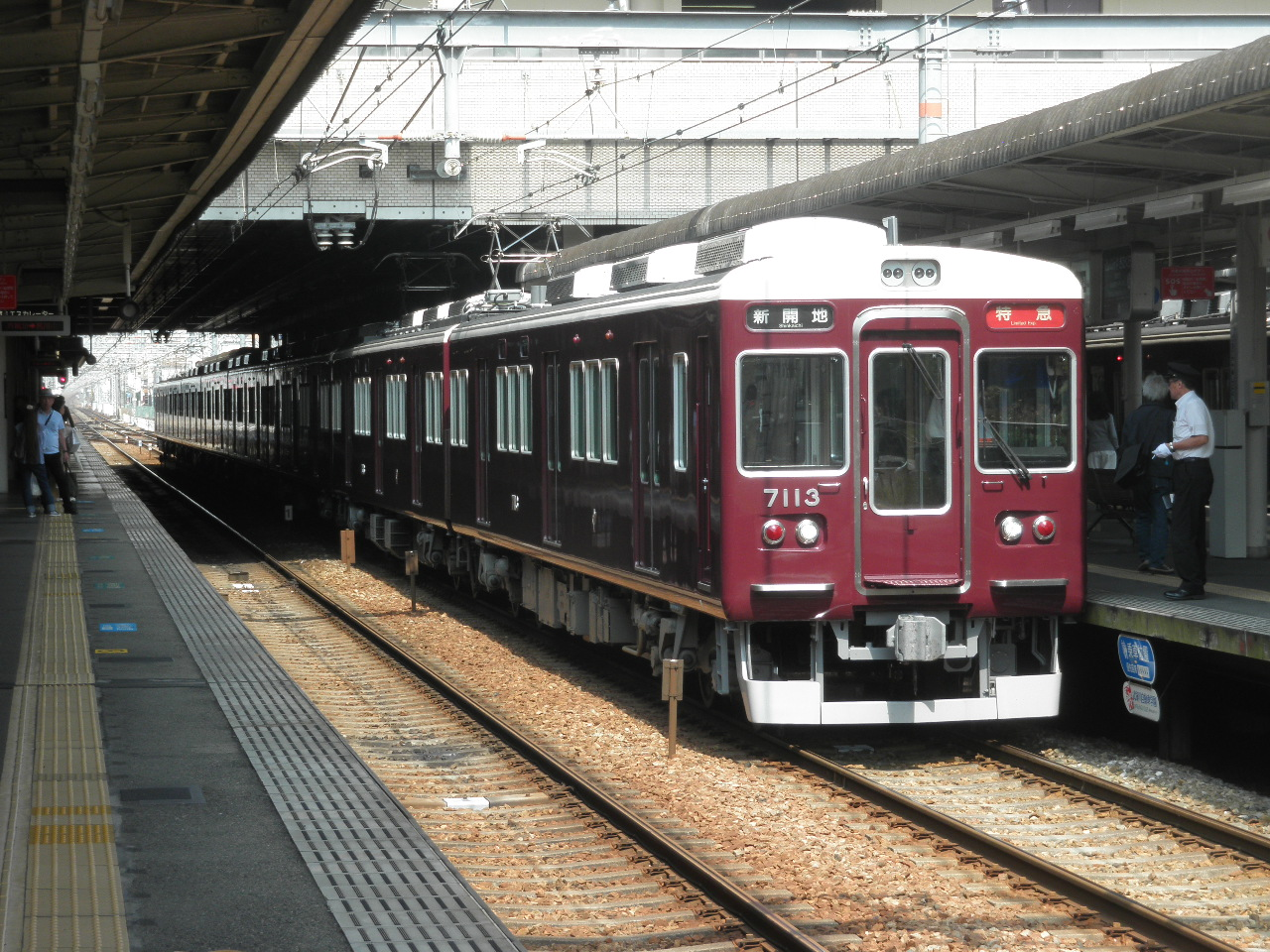 VVVF化された7013F